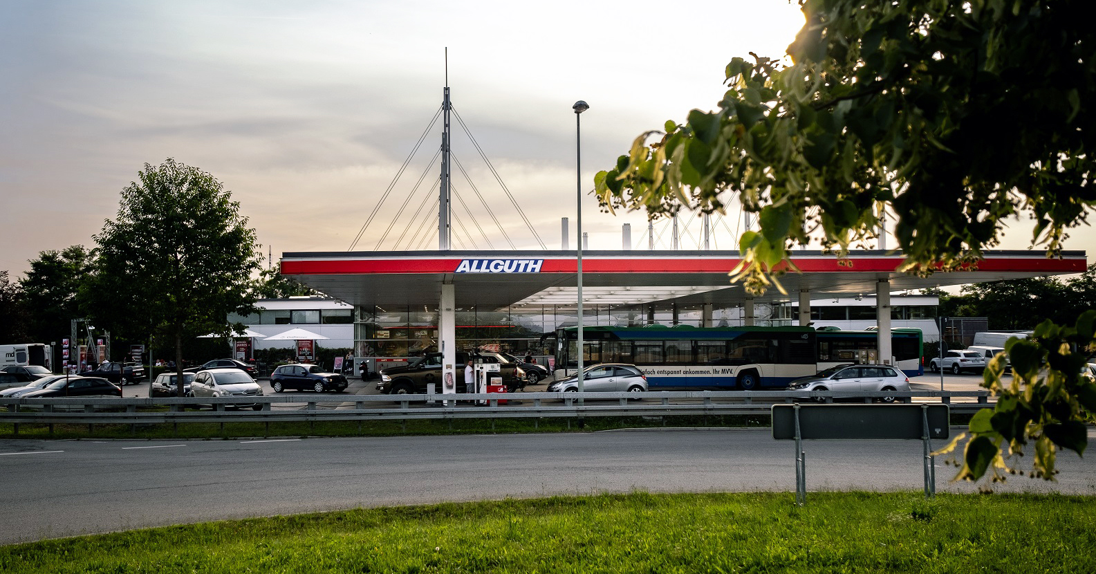 Allguth Station in Unterföhring bei München